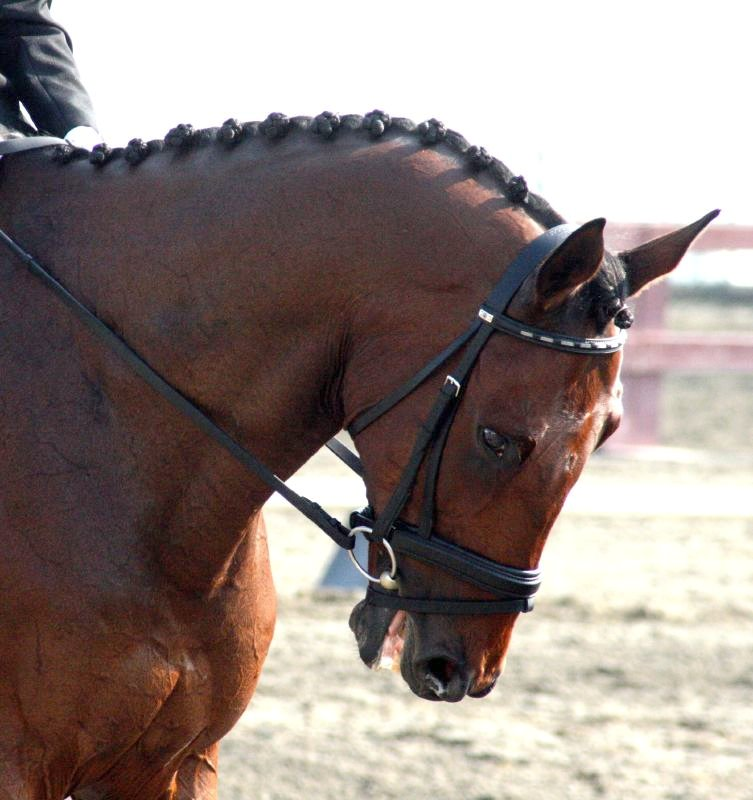 braided mane